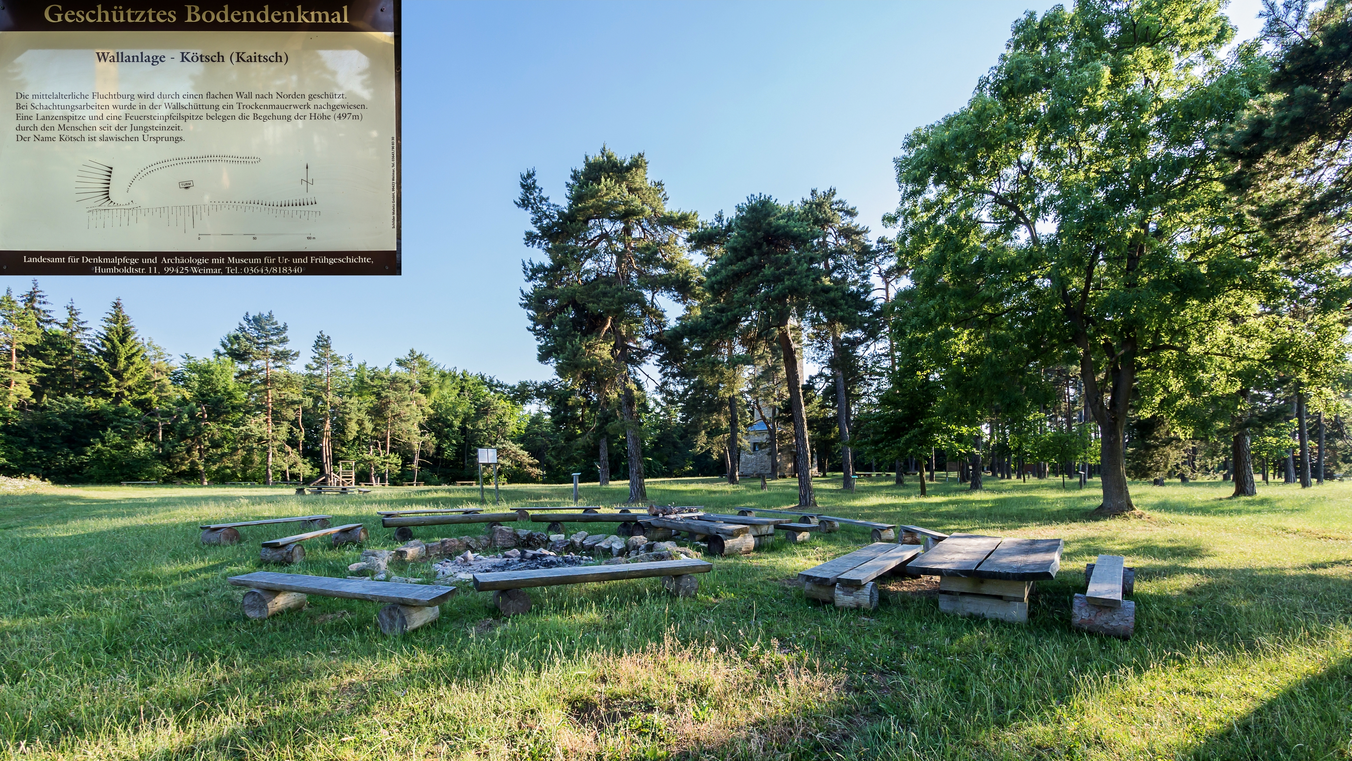 Kiliansroda Weithin sichtbare Höhe mit allmählichem Abfall nach Nordwest und Ost und etwas steilerem Hang nach Südost Kötsch,Wallburg Infotafel eingefügt